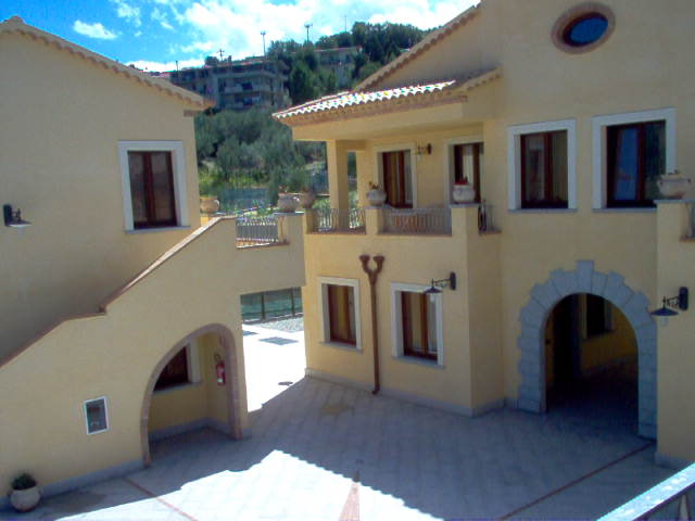 Davoli Borgo Antico